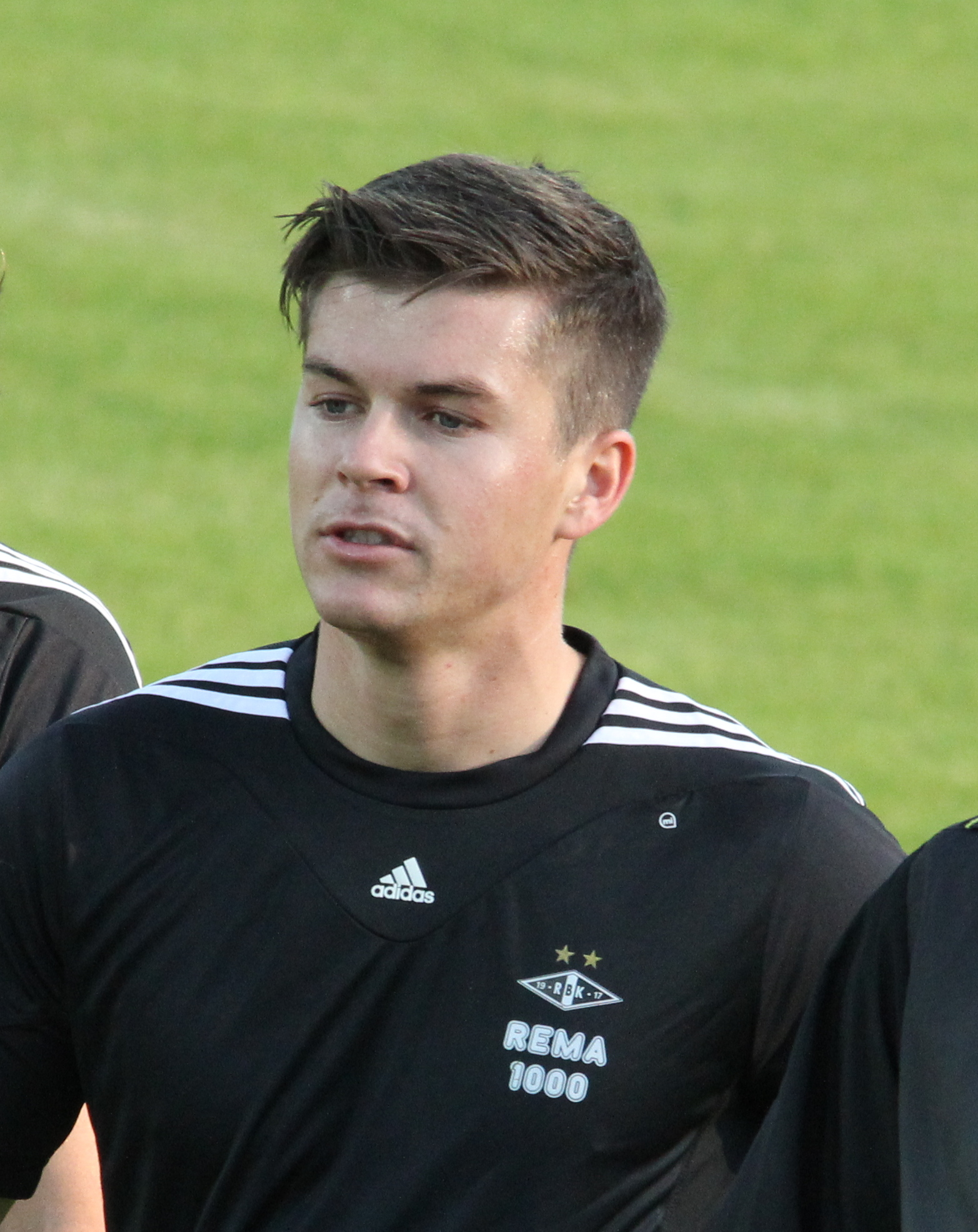 Pål André Helland på Sandnes stadion 25. august 2013